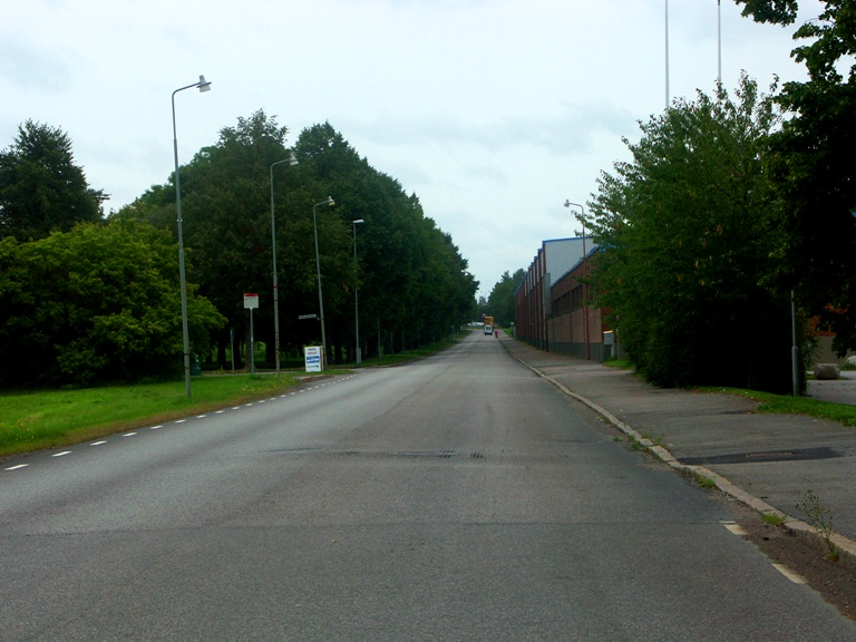 Fikskebyvägen i Norrköping, Sverige. "Fiskeby järnväg"